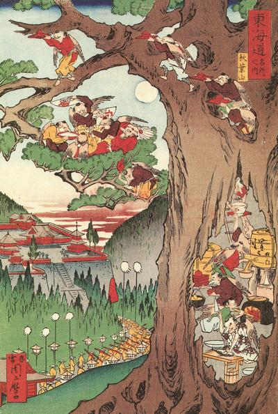 Mount Akiba (東海道名所之内 秋葉山)